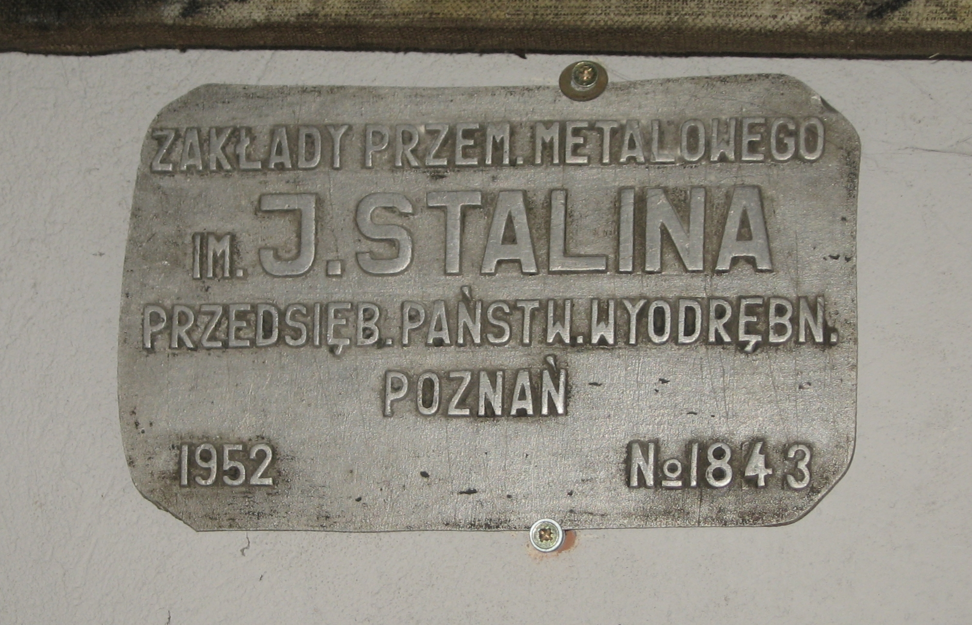 Tablica Zakładów Przemysłowych im. Józefa Stalina w Poznaniu - dzisiejszy H. Cegielski